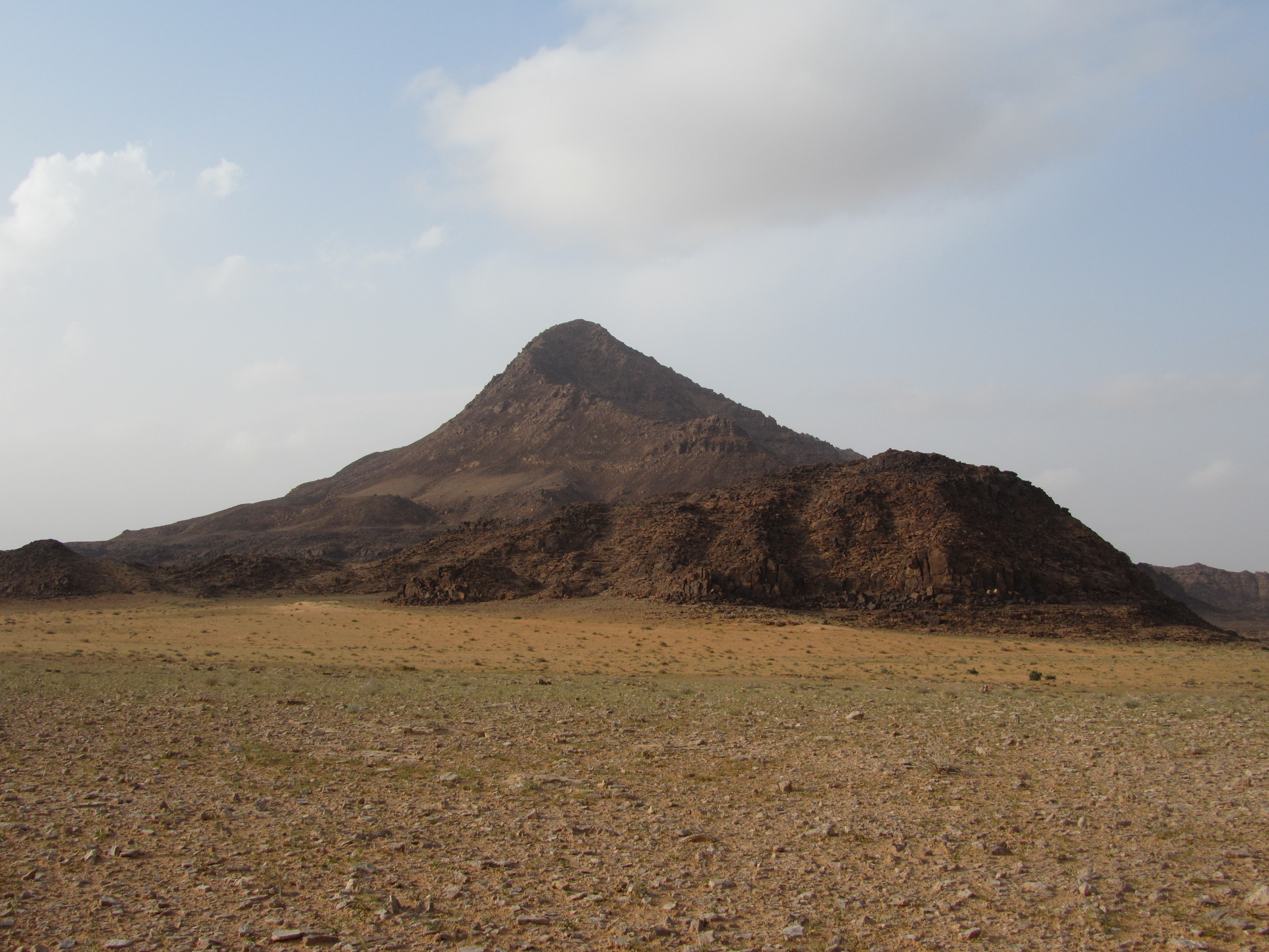 صورة لجبل جلدية من الجنوب